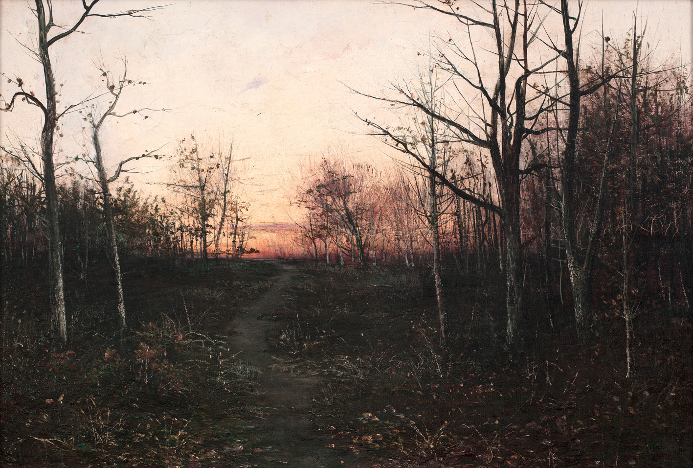 Manuel Ramos Artal (1855-1900), pintor paisajista español que bajo el estímulo de Carlos de Haes viajó por los Países Bajos, Italia, Francia y Portugal. Su máximo galardón oficial fue una tercera medalla en la Exposición Nacional de Bellas Artes de 1884 por su Paisaje de las cercanías del Cristo de la Vega (Toledo).